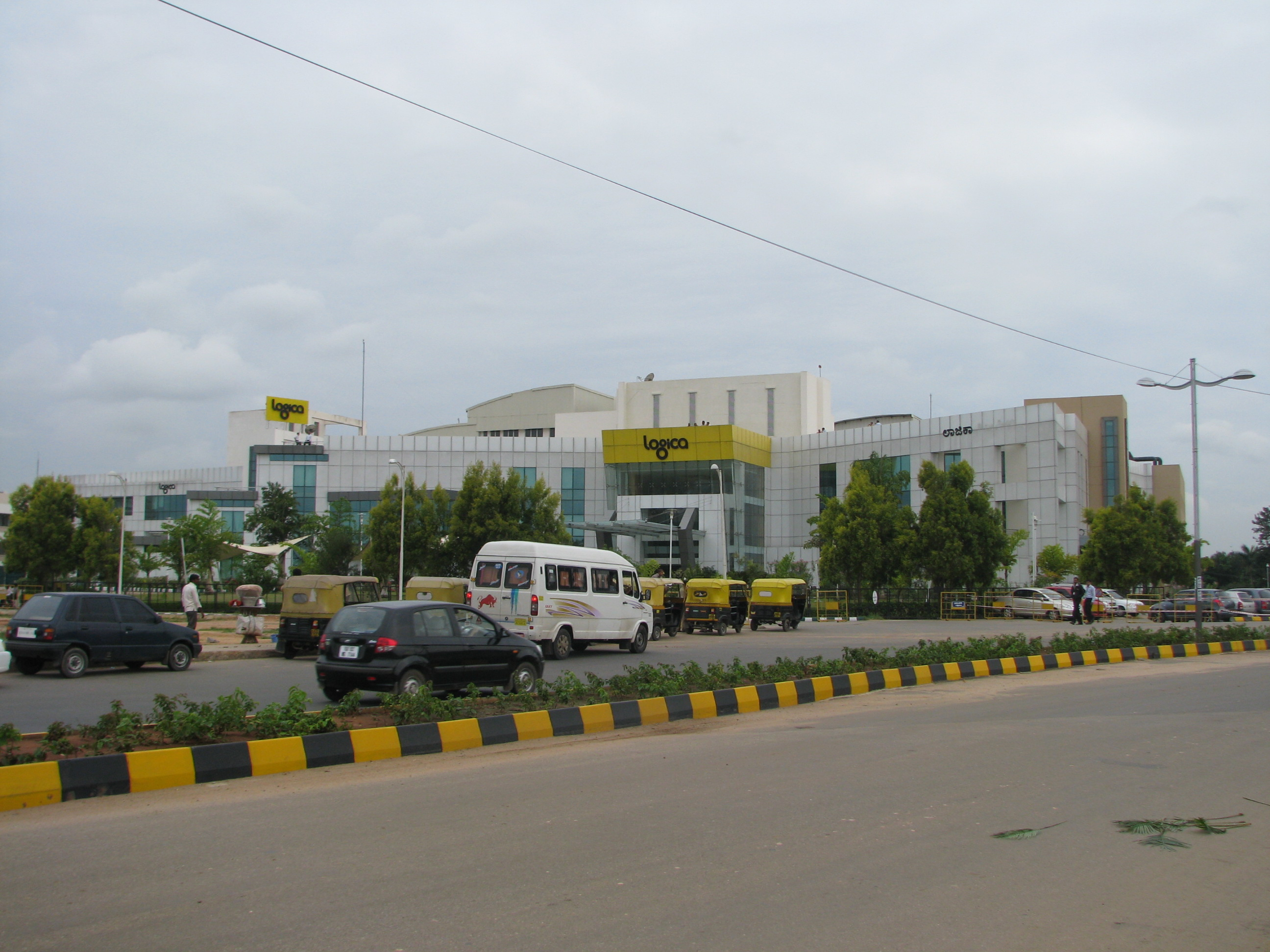 Logica